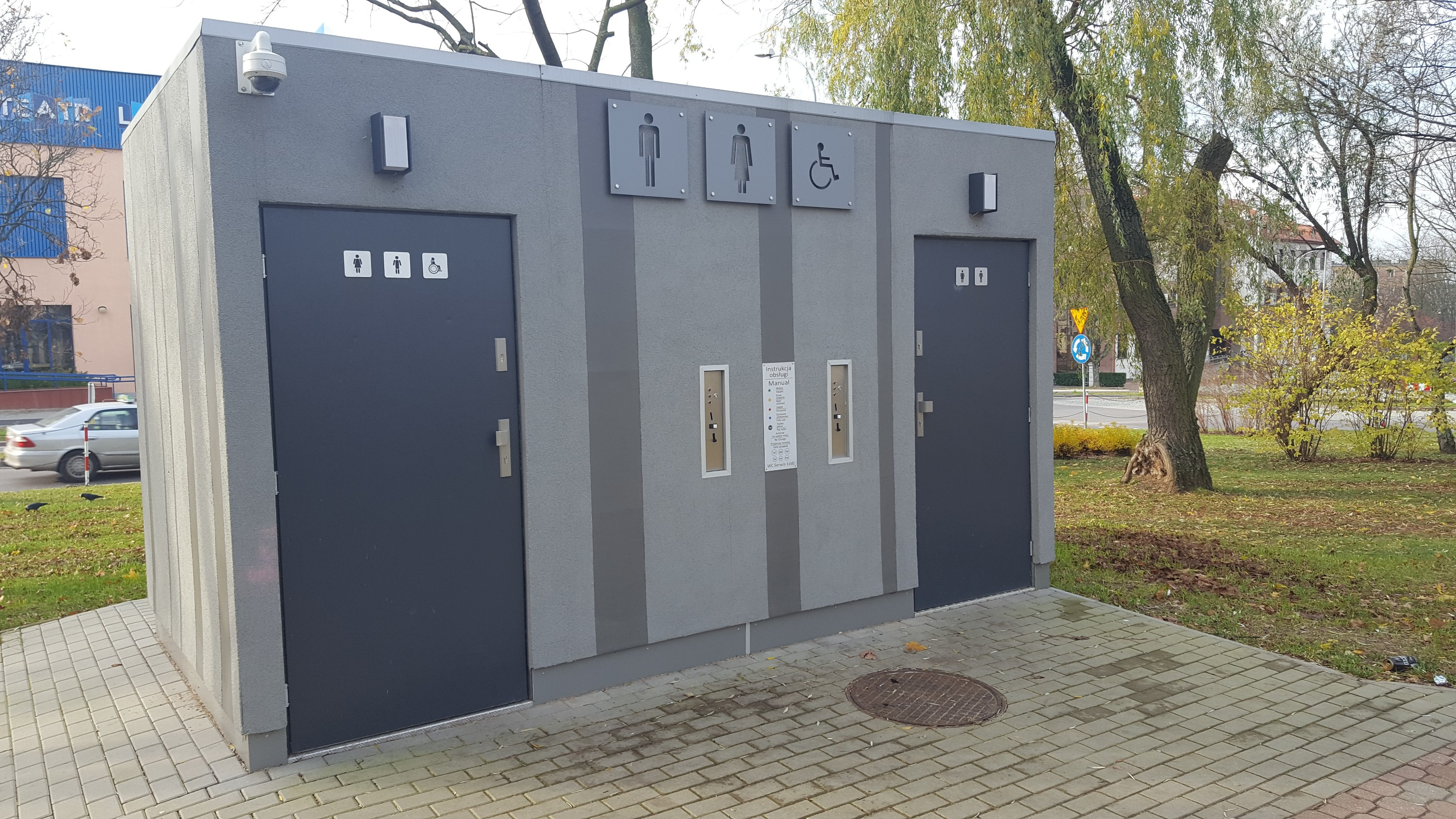 Toaleta publiczna w Łomży, Polska